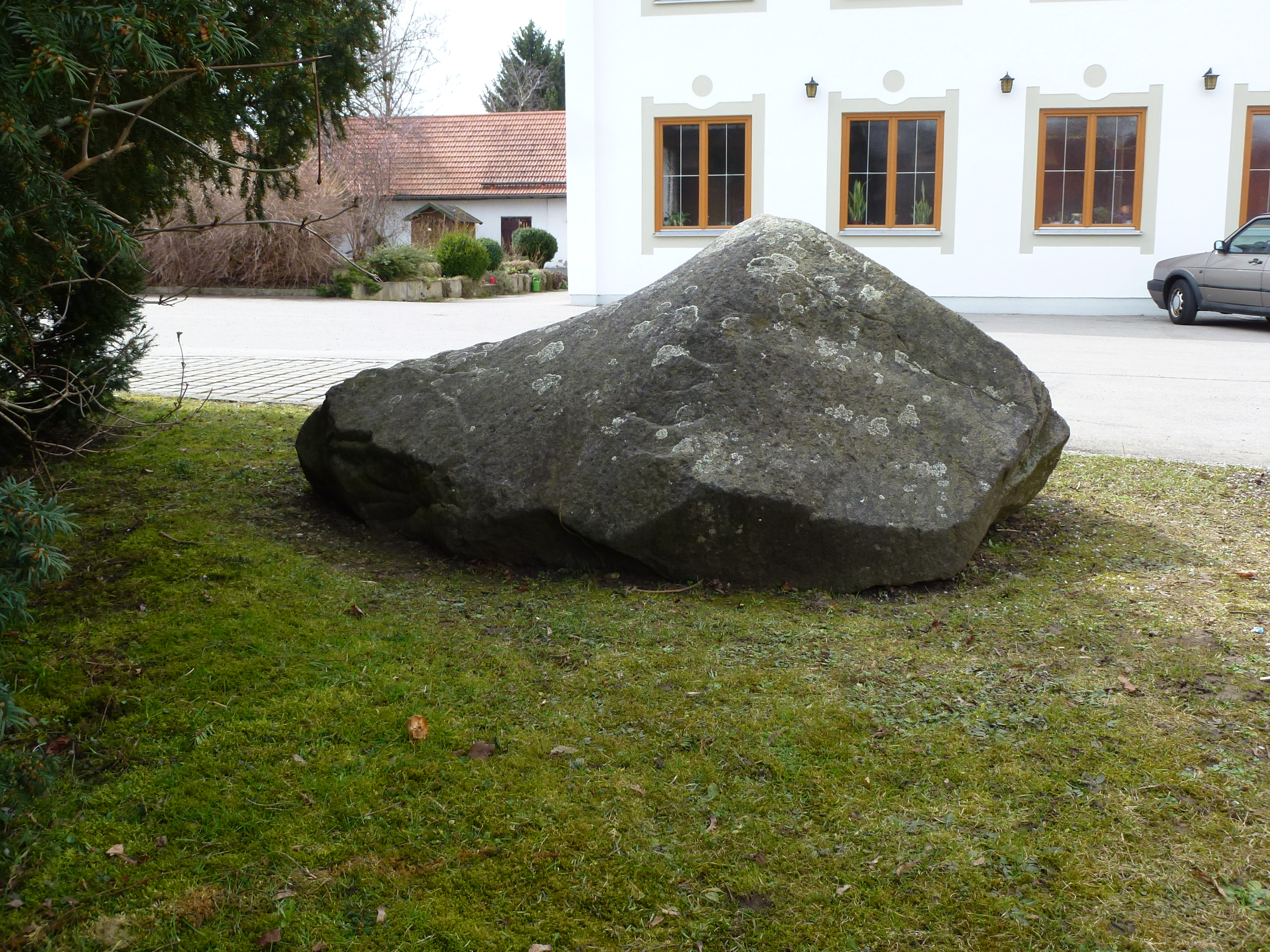 Erratischer Felsblock in der Gemeinde Thaining, ca. 2m lang. Der Block lag nicht immer hier, er wurde nach Aussagen von Gemeindebewohnern (mit Foto belegbar) erst Ende der 30er-/Anfang der 40er-Jahre vom westlichen Ortsrand an den heutigen Platz gebracht. Dieser befindet sich -anders als in den Geo-Koordinaten dargestellt- jedoch nicht nördlich der Straße "Am Anger", sondern südlich davon, unmittelbar beim Parkplatz der Gasttätte "Zum Alten Wirt". Ansicht von Osten